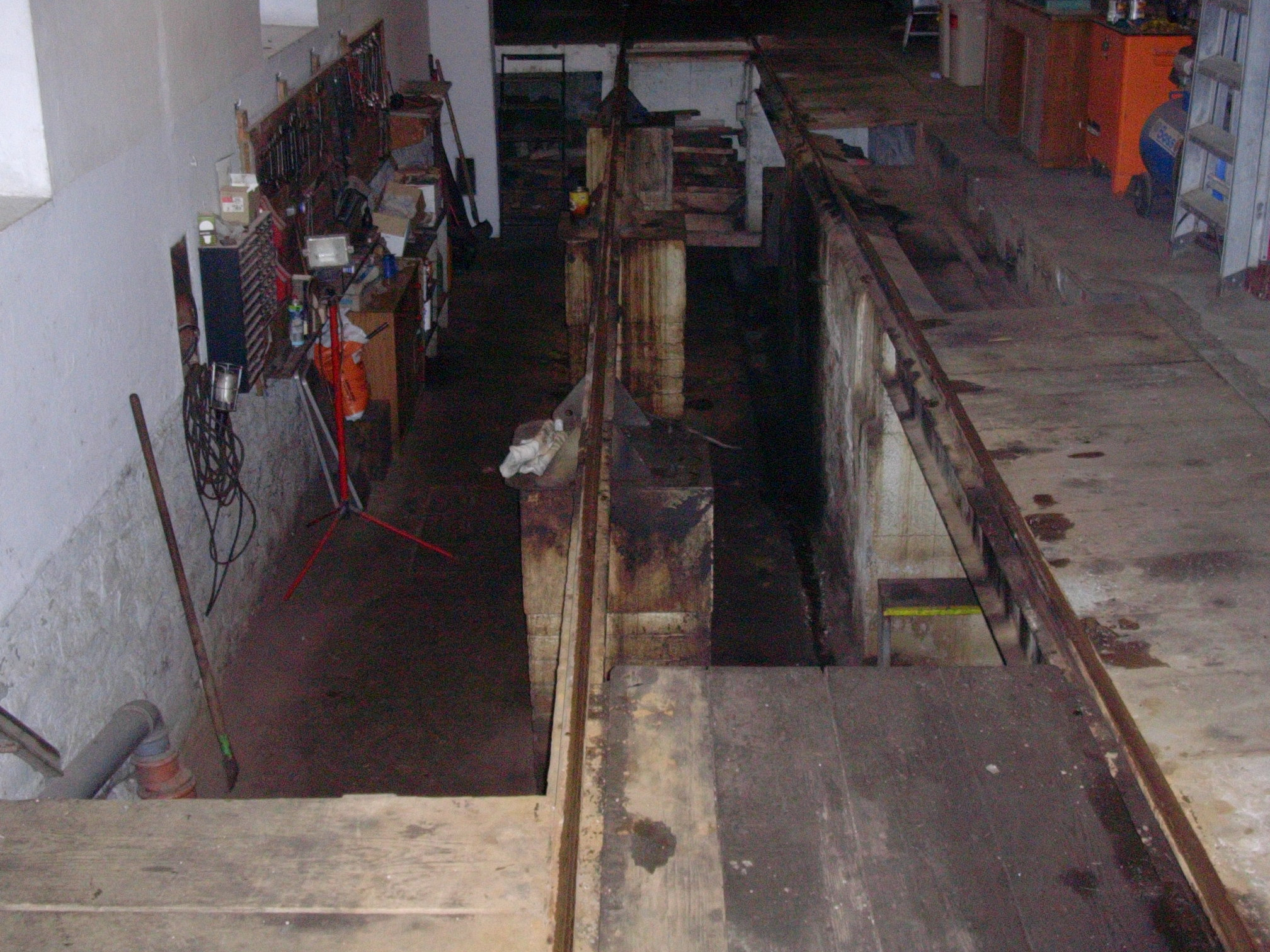 Untersuchungsgrube